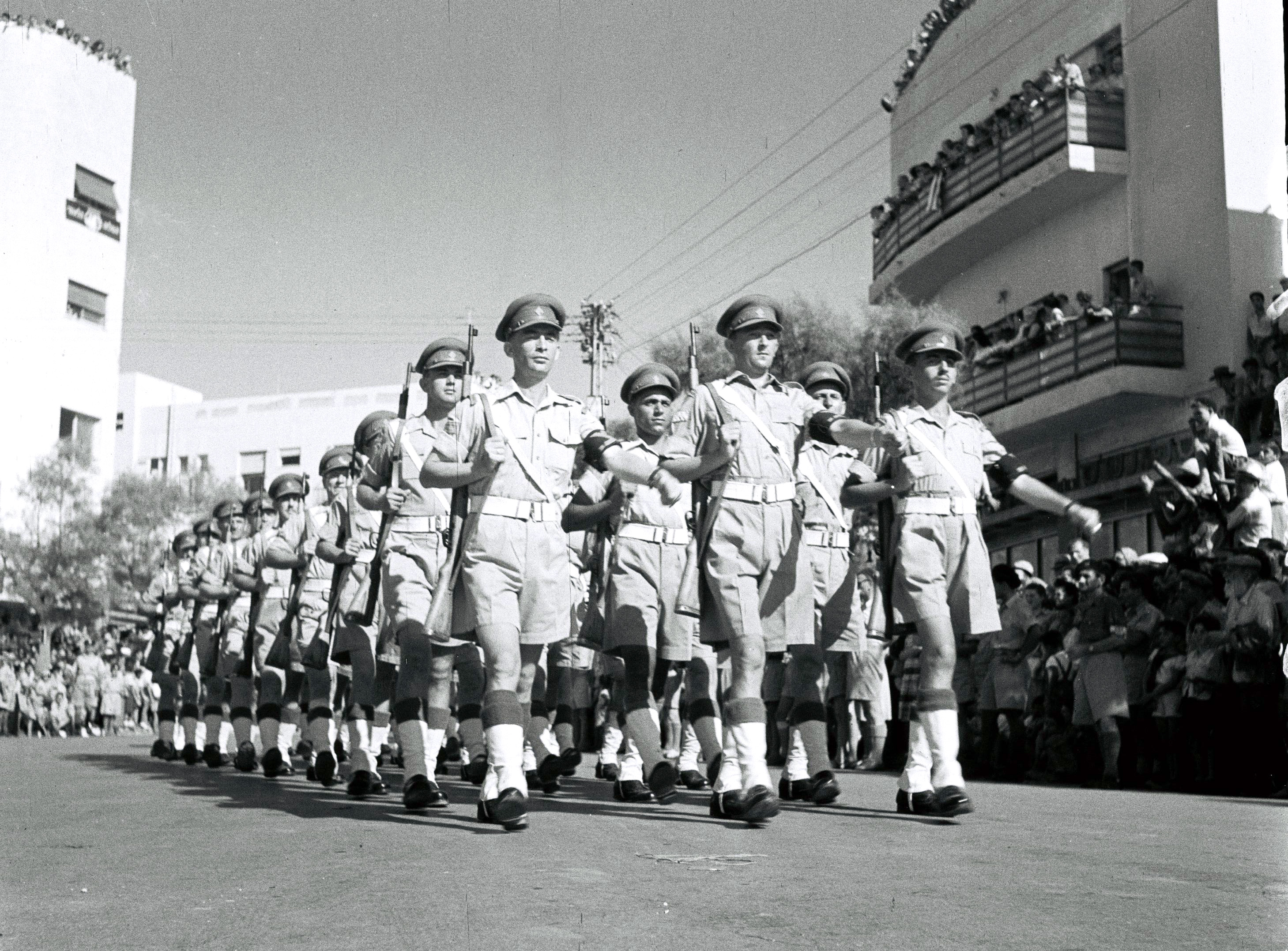 MILITARY POLICE MARCHING ON ALLENBY STREET DURING THE YOM HAMEDINA PARADE IN TEL AVIV. (27/7/1948) מצעד חיילי צהל (משטרה צבאית) ביום המדינה ברחוב אלנבי בתל אביב. Photo: KLUGER ZULTAN.